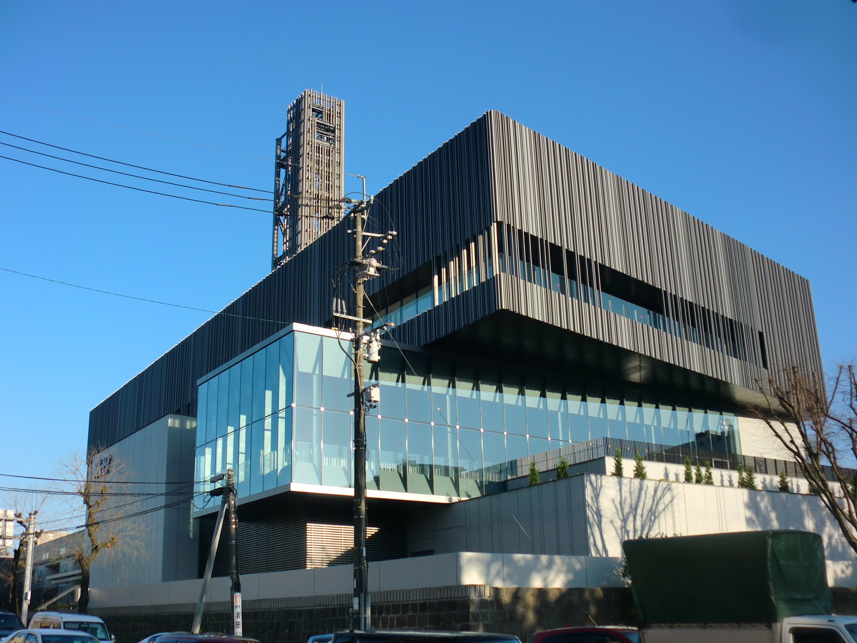 熊本市中央区にある熊本県民テレビ（2016年移転後）